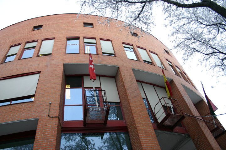 Ayuntamiento de Coslada Datos de la fotografía Autor: Year of the dragon Día: Miércoles 23 de Febrero del 2005. Cámara: Canon EOS-300D Retoque fotográfico: The Gimp Licencia: GNU FDL Notas: La imagen se realizó el día de la nevada del 2005 en Madrid. Categoría:España (imagen)